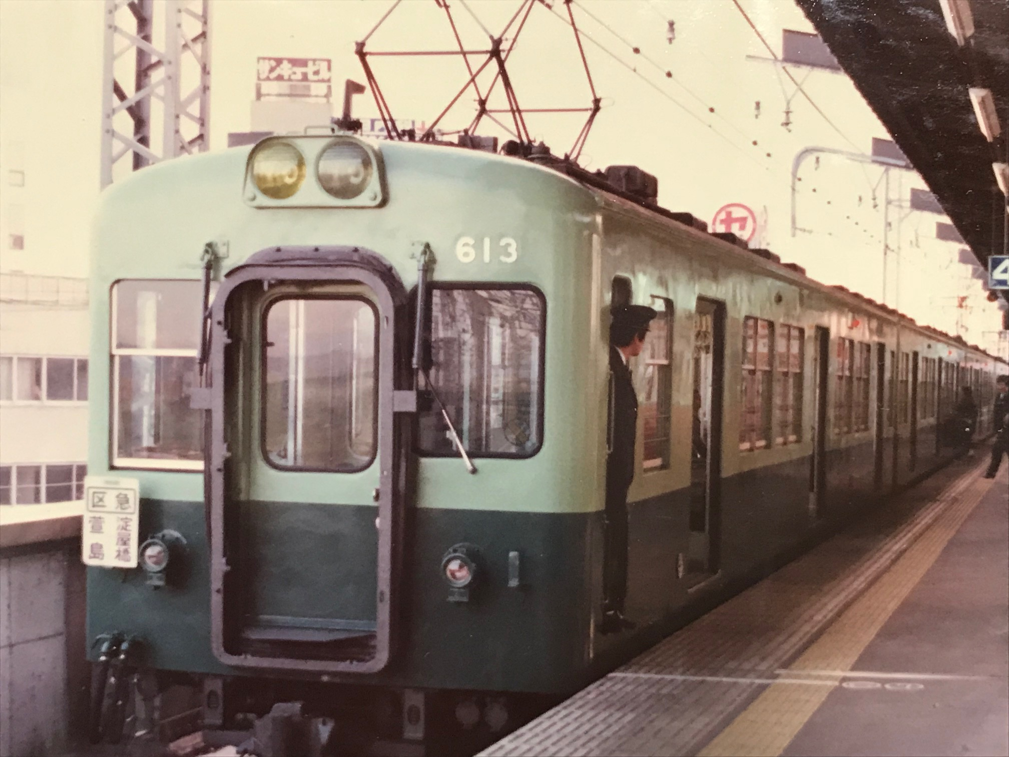 京阪600系区急